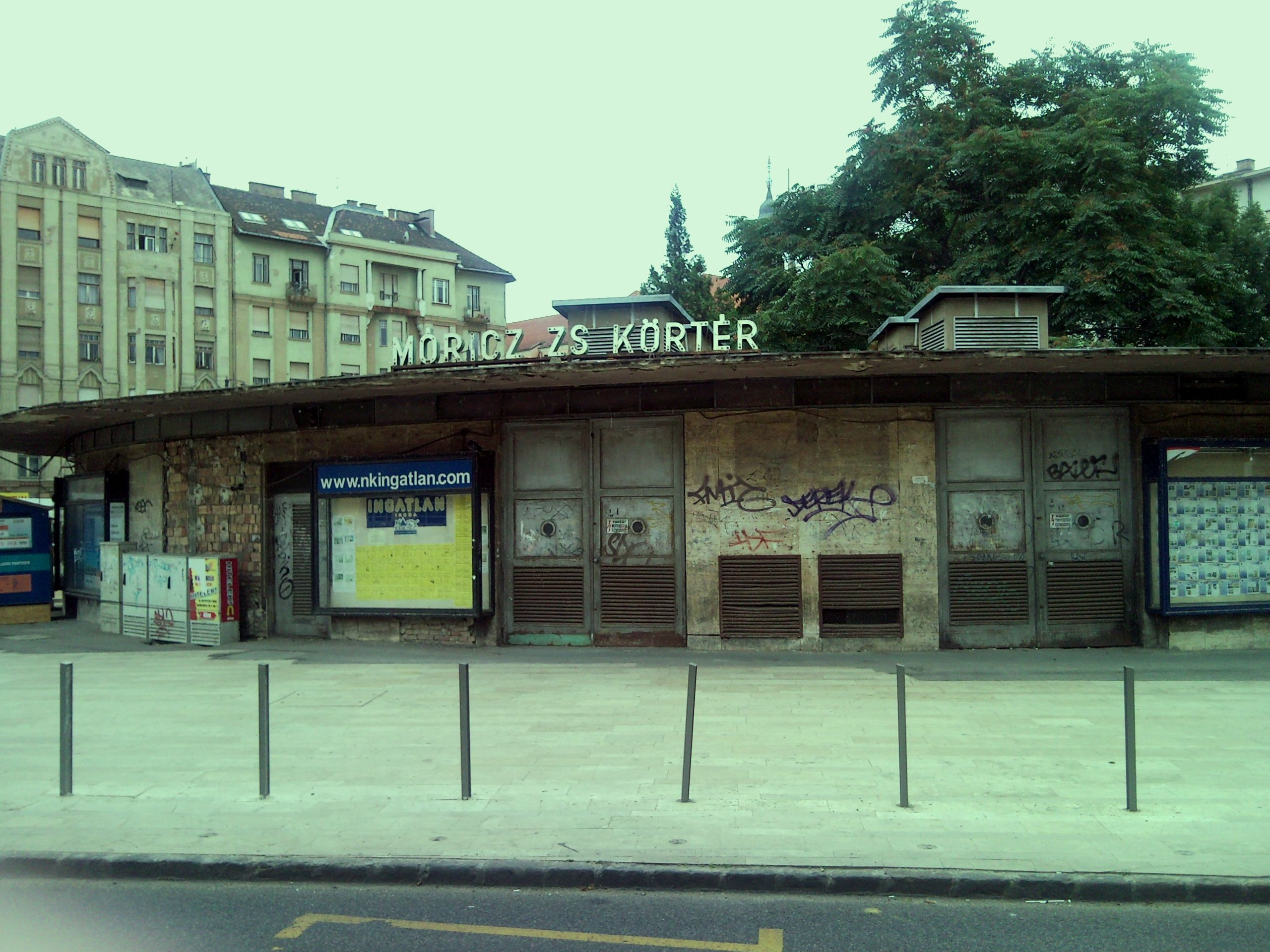 Móricz Zsigmond körtér, Budapest, egykori HÉV-állomás